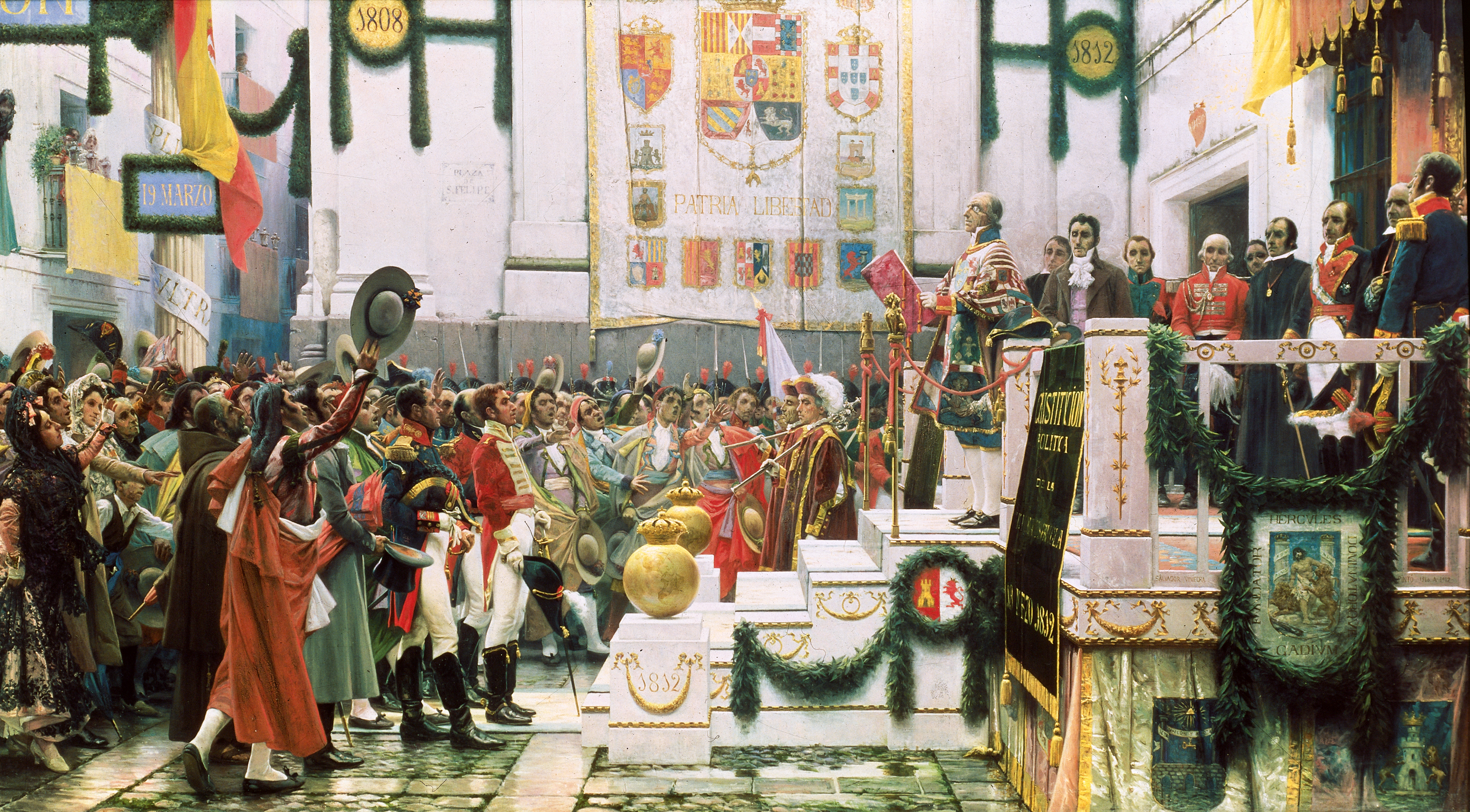 Constitutional Court of Cádiz 1812, Promulgación de la Constitución de 1812